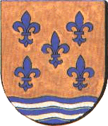 Escudo perteneciente a uno de los linajes Alvarado.